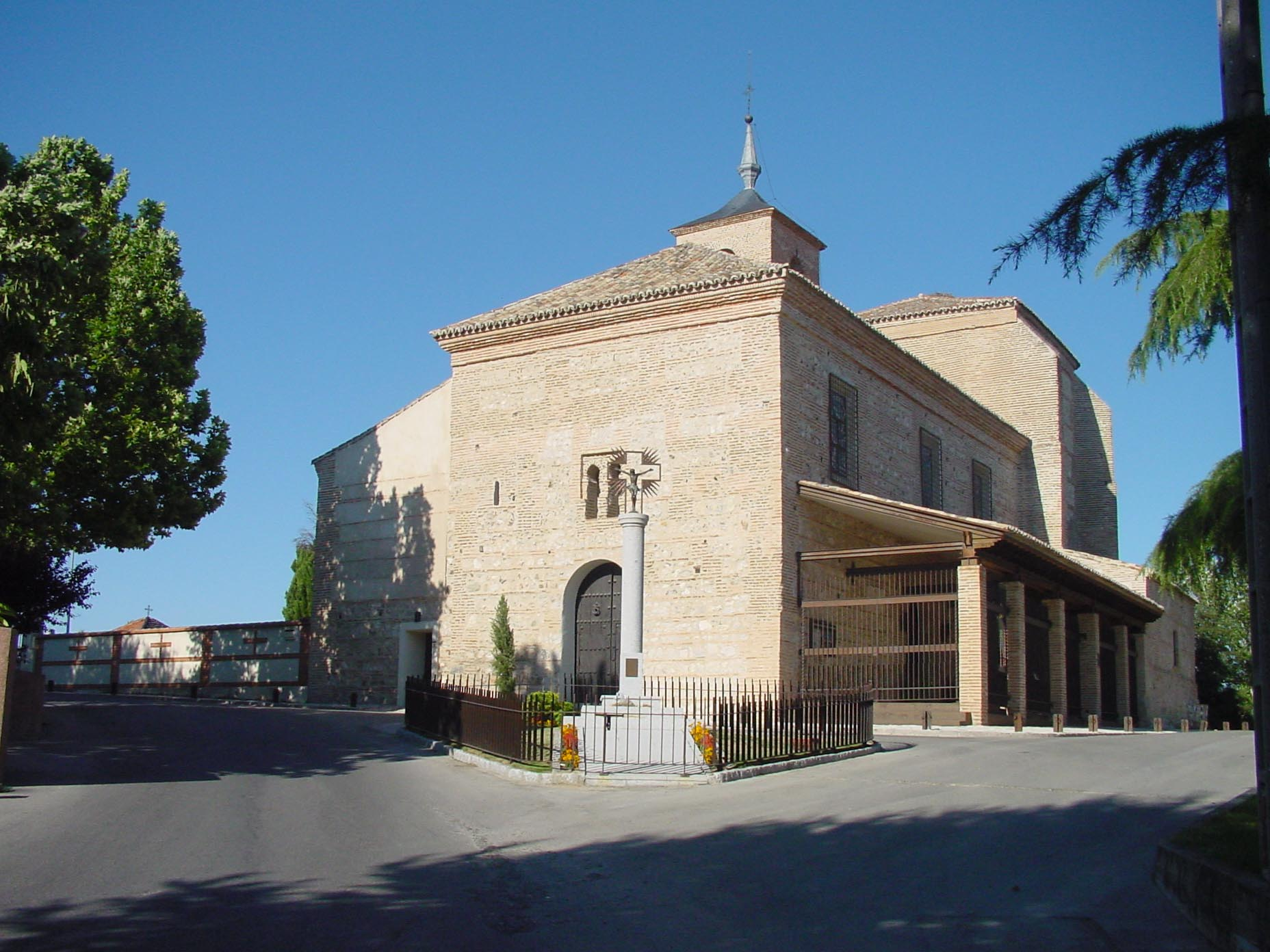 Iglesia en Griñón.